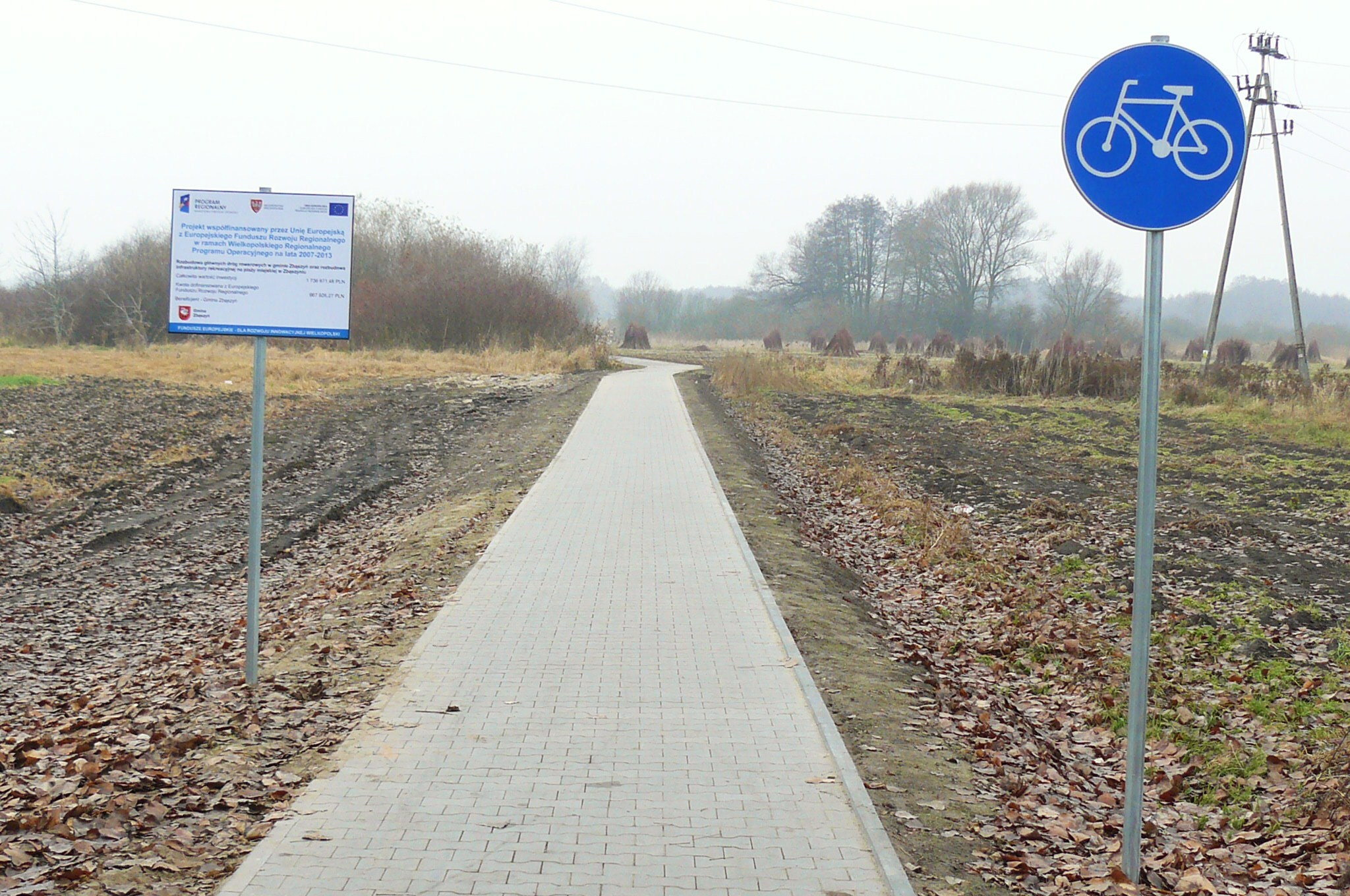 Promenada, Zbąszyń.